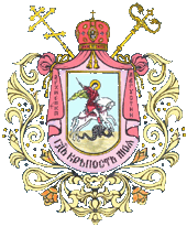 Герб архієпископа Августина (Маркевича).gif: особистий герб архієпископа Львівського і Галицького Августина (Маркевича)